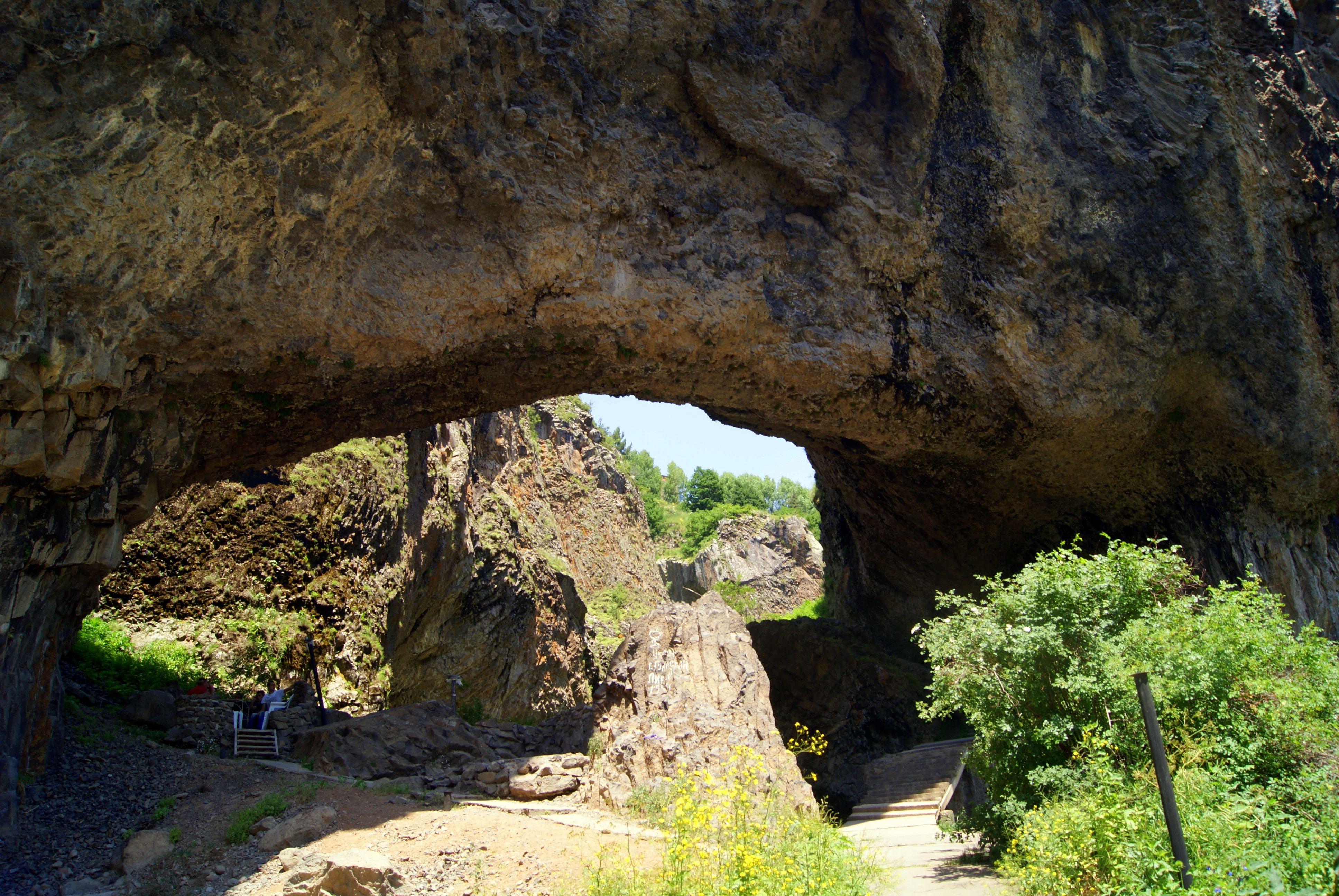 «Բախտի կամար» բնական քարե թունել